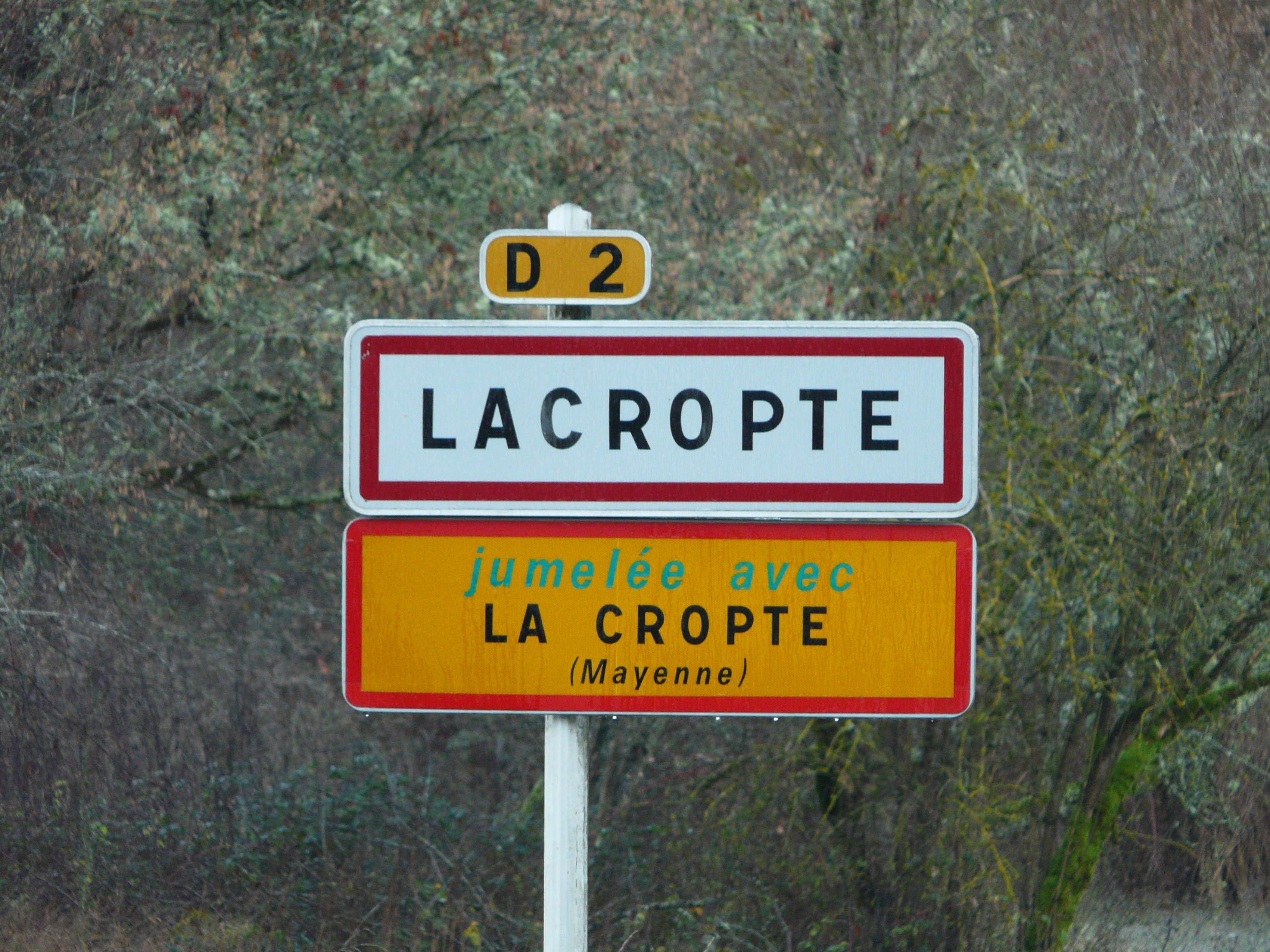 Panneau de jumelage de Lacropte, Dordogne, France.